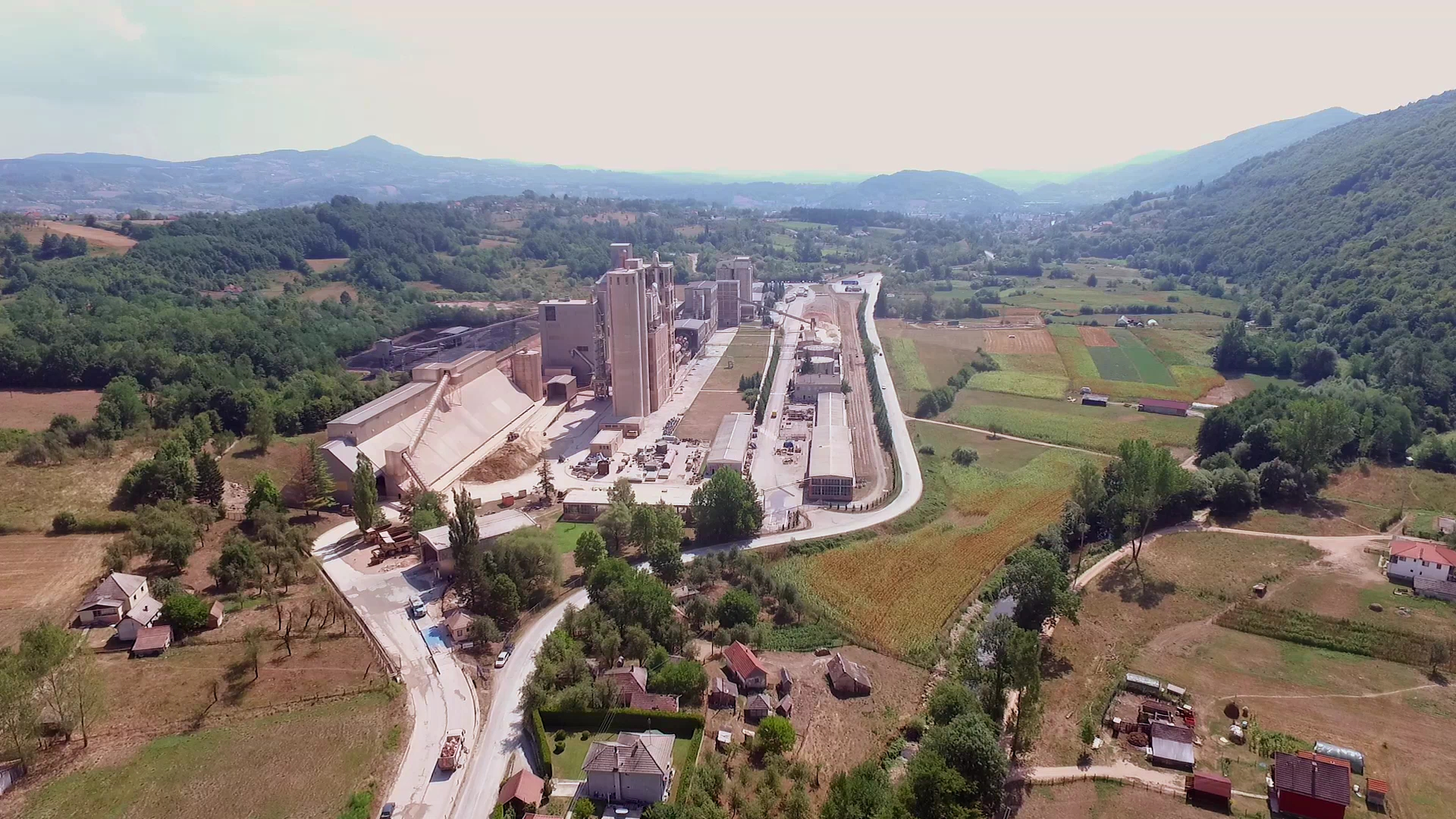 Титан цементара Косјерић